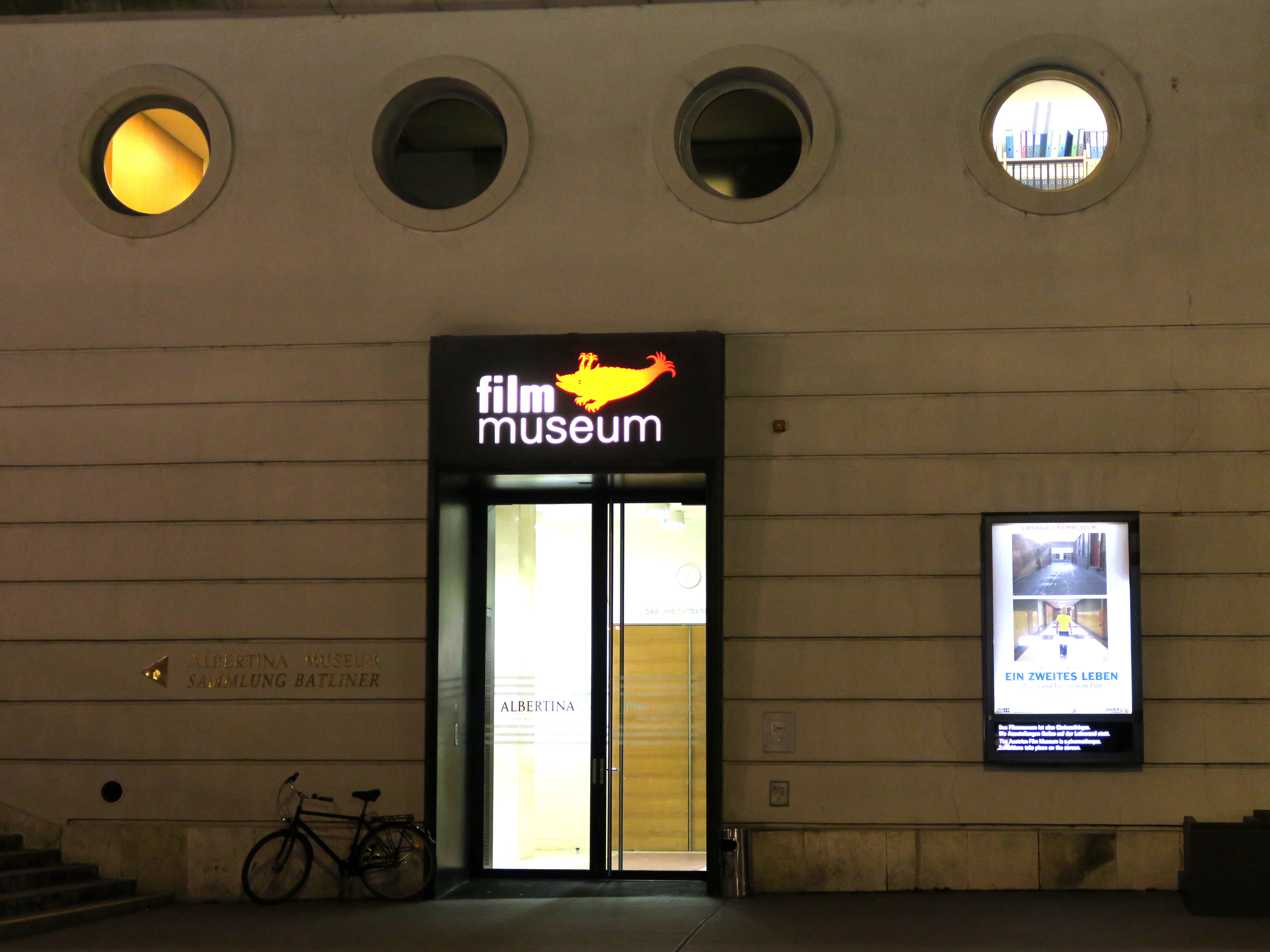 Eingangsbereich des Filmmuseums im Gebäude der Altbertina mit Bulleraugenfenstern oben und Schaukasten unten rechts